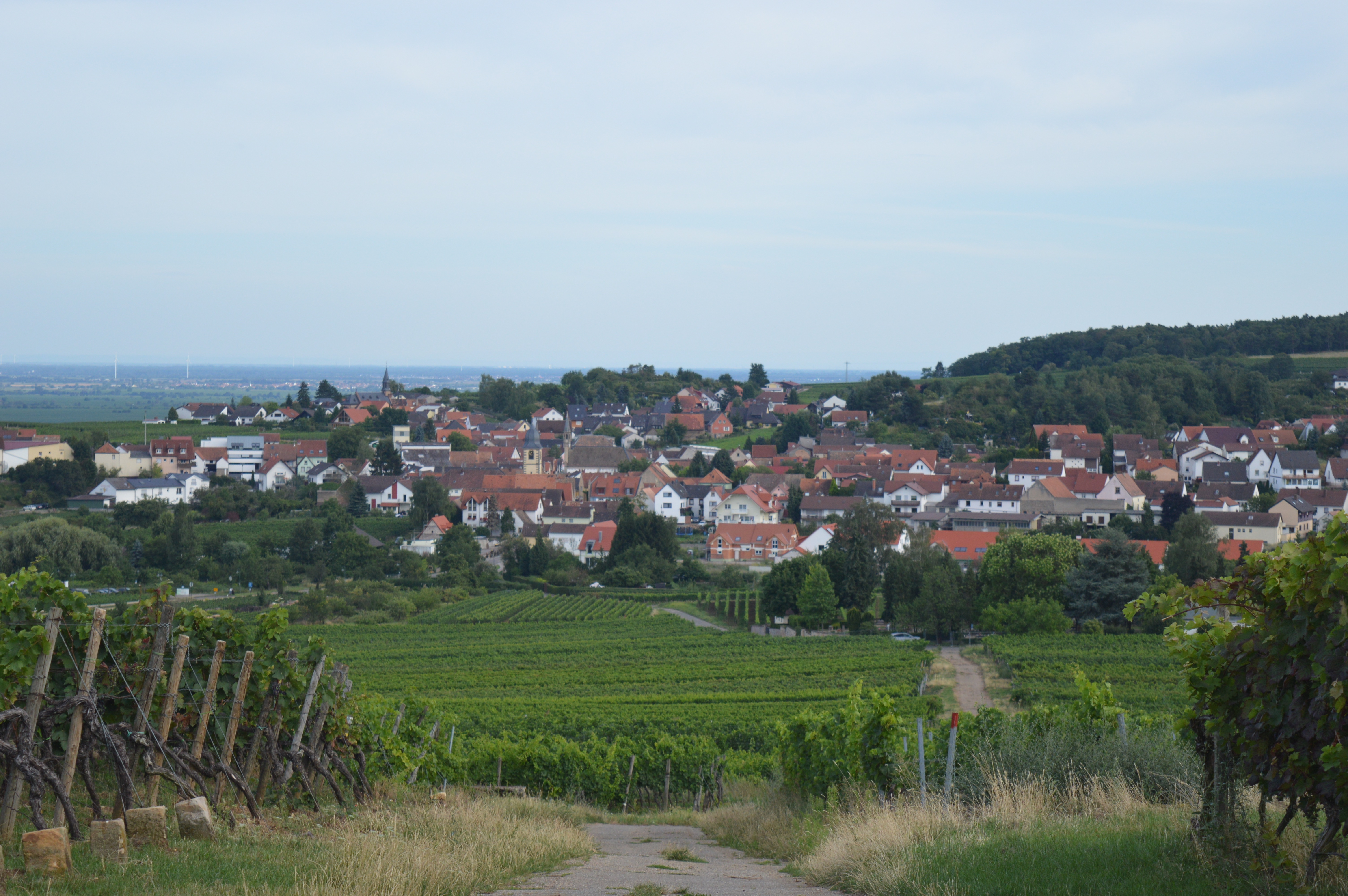 Blick auf Leistadt aus dem Wingert auf einem Wanderweg von Weisenheim am Berg nach Leistadt (Stadtteil Bad Dürkheim)